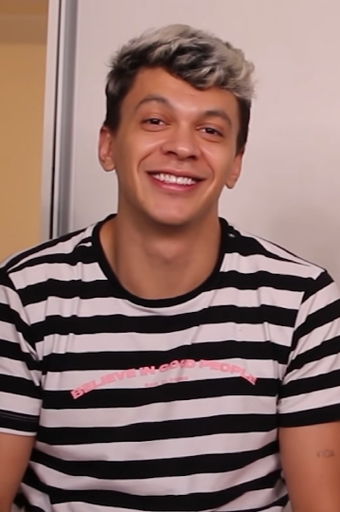 Júlio Cocielo in 2020